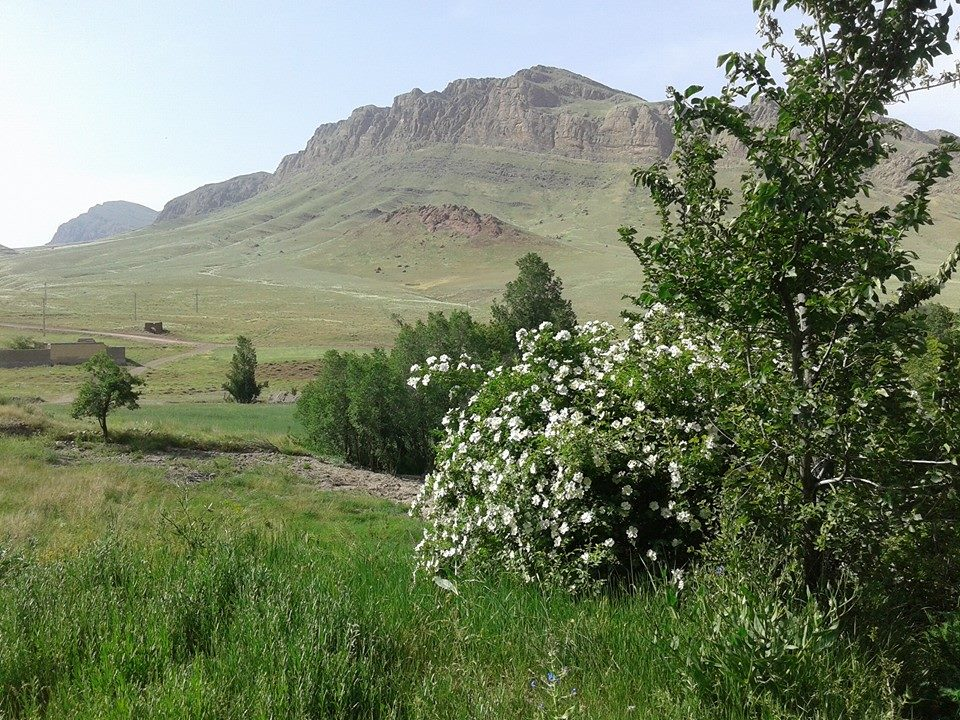 روستای پیراسحق ایران-استان آذربایجان شرقی -شهرستان مرند